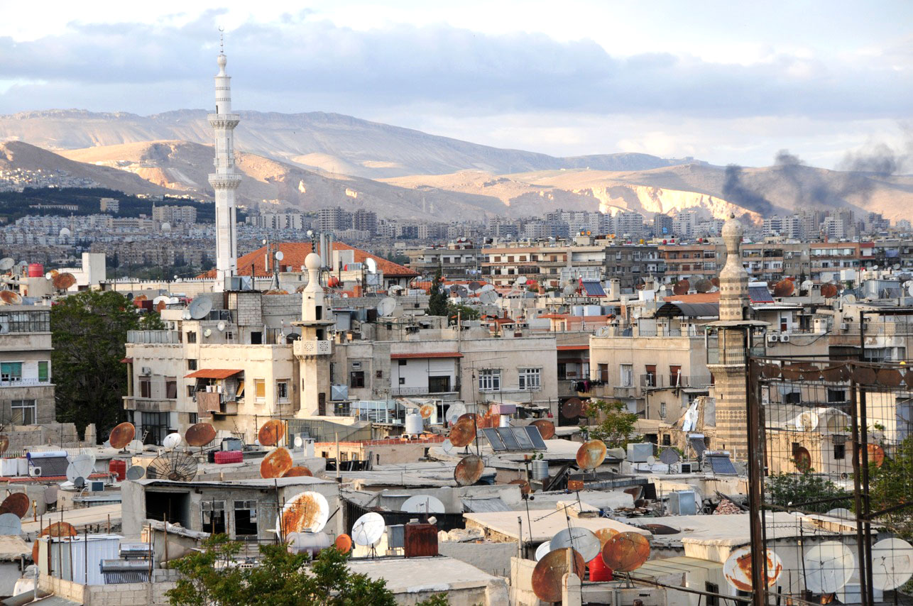 Evening over Damascus / Syria